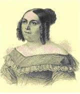 Wilhelmine Schulz/Schultz (ab 1830 verheiratete von Wrochem), *17. Dez. 1798 in Berlin, †18. Nov. 1839, Flötistin, Sängerin, Schauspielerin.